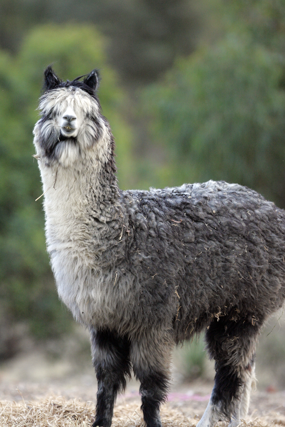 Alpaca